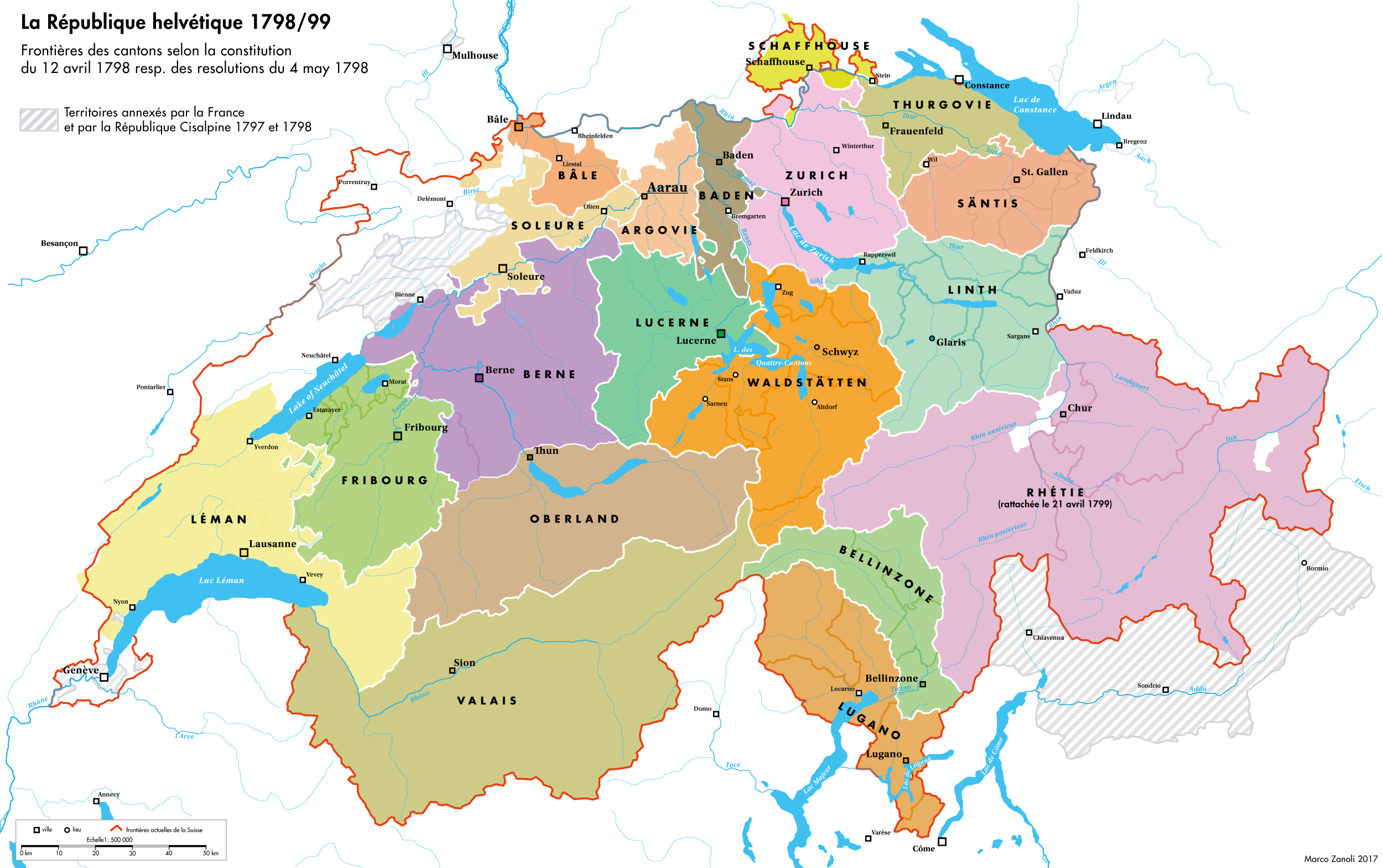 La République Helvétique 1798/99. Les frontières des cantons selon la Constitution du 12 avril 1798 resp. des résolutions du 4 may 1798..